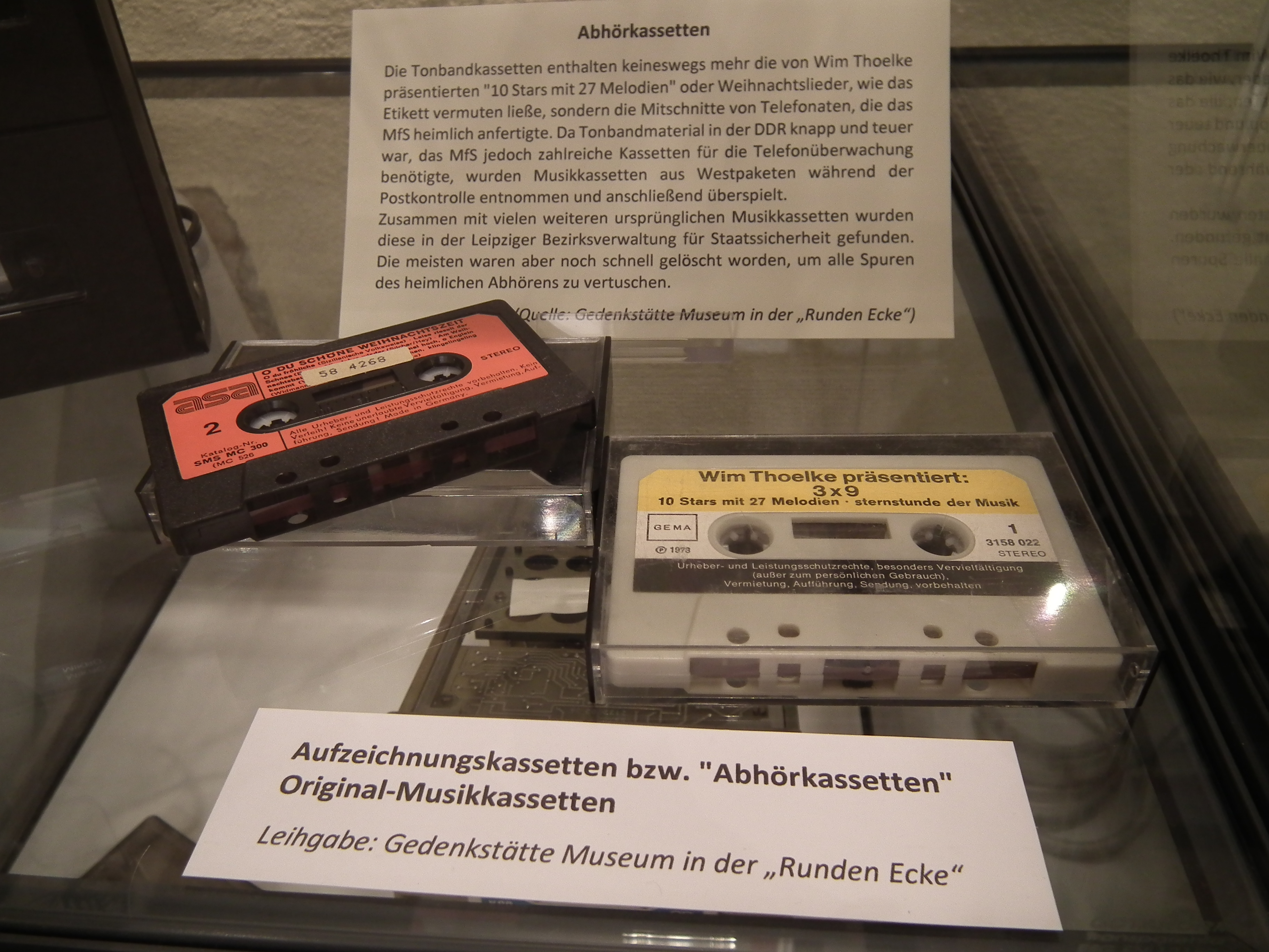 2019-09-14 Stadt- und Waagenmuseum Oschatz